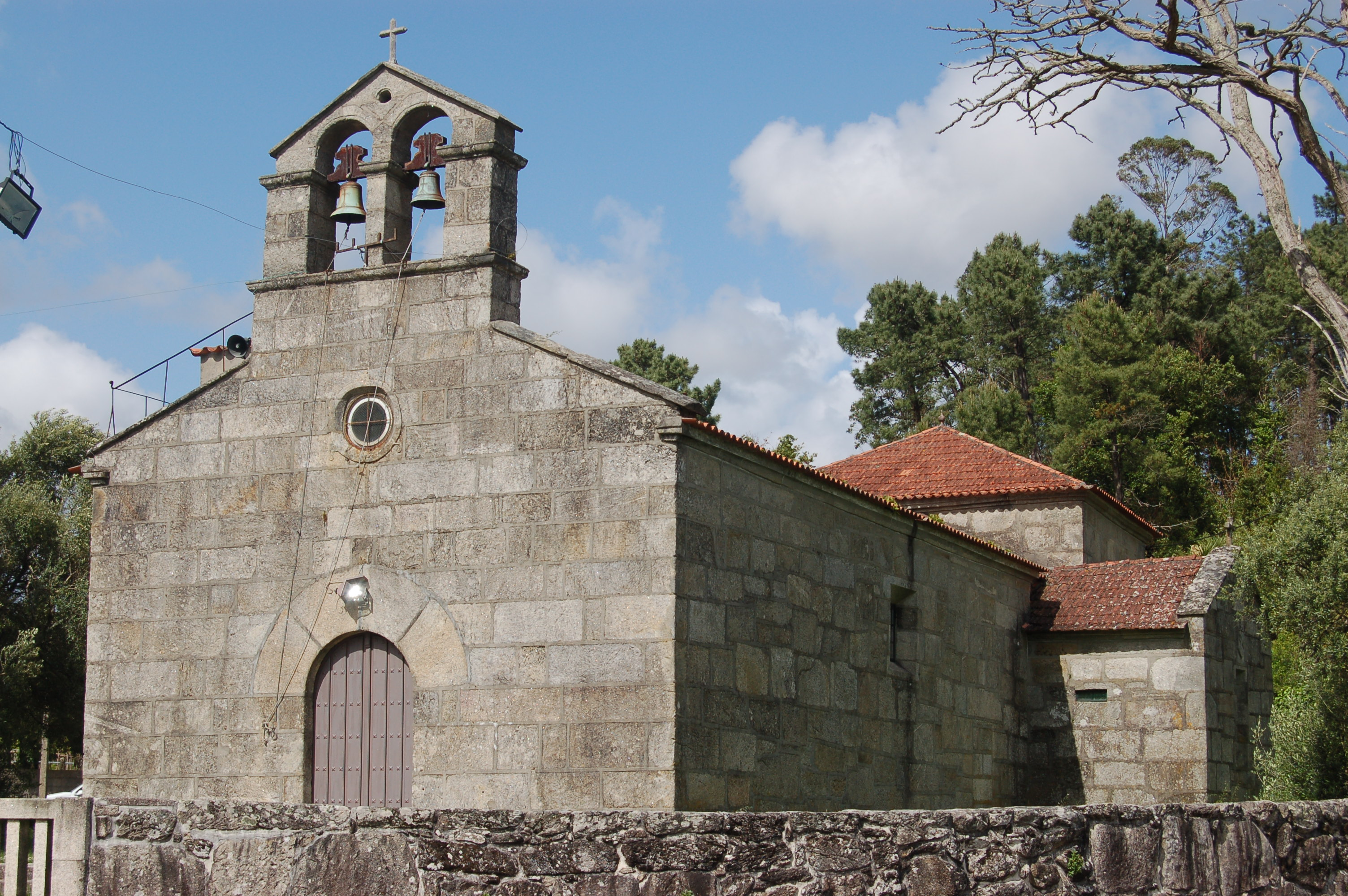 Igrexa parroquial de Santa Cristina de Cobres (Vilaboa)